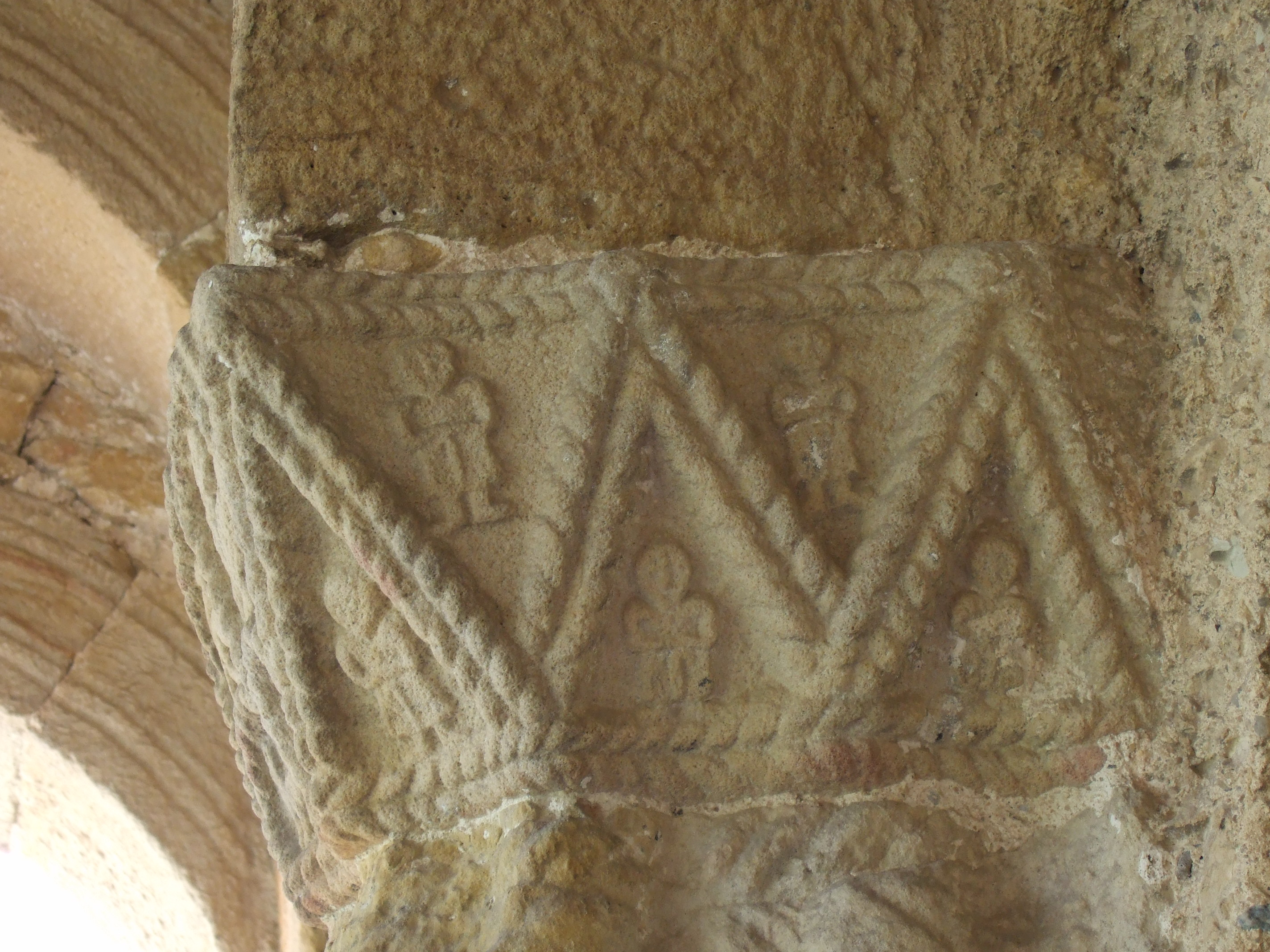 Oviedo - Santa María del Naranco - Capitel